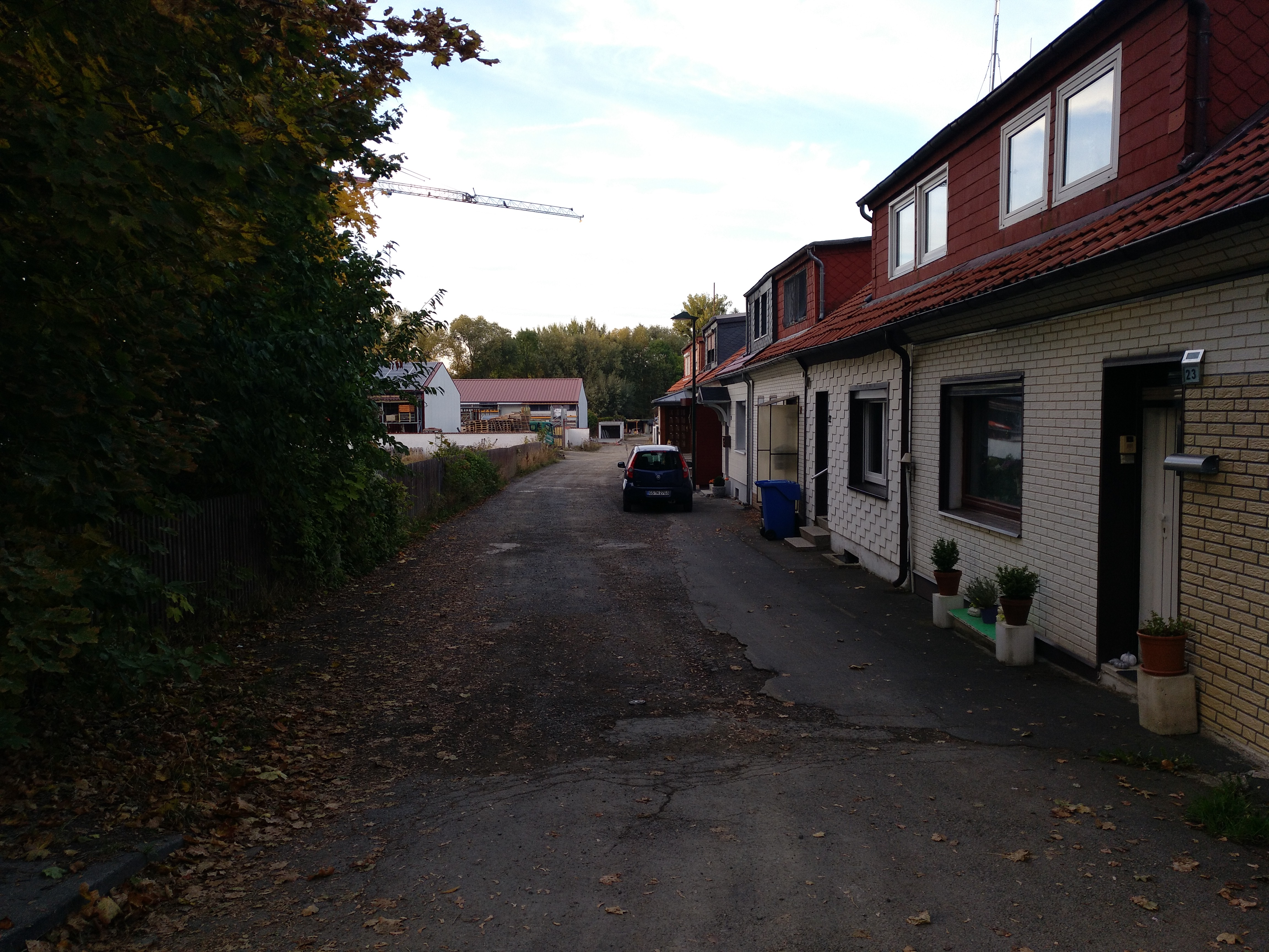 Heutige Siedlung Mathildenhütte